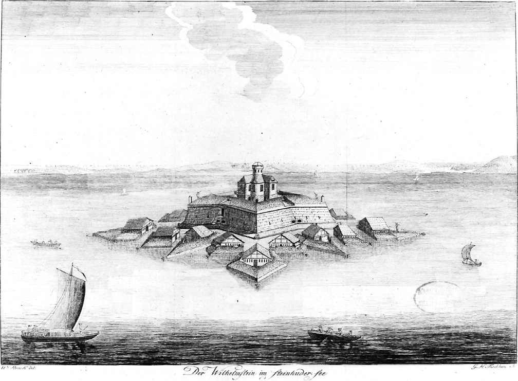 Inselfestung Wilhelmstein im Steinhuder Meer, Kupferstich